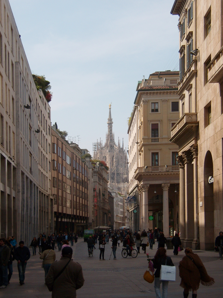 Corso Vittorio Emanuele II a Milano